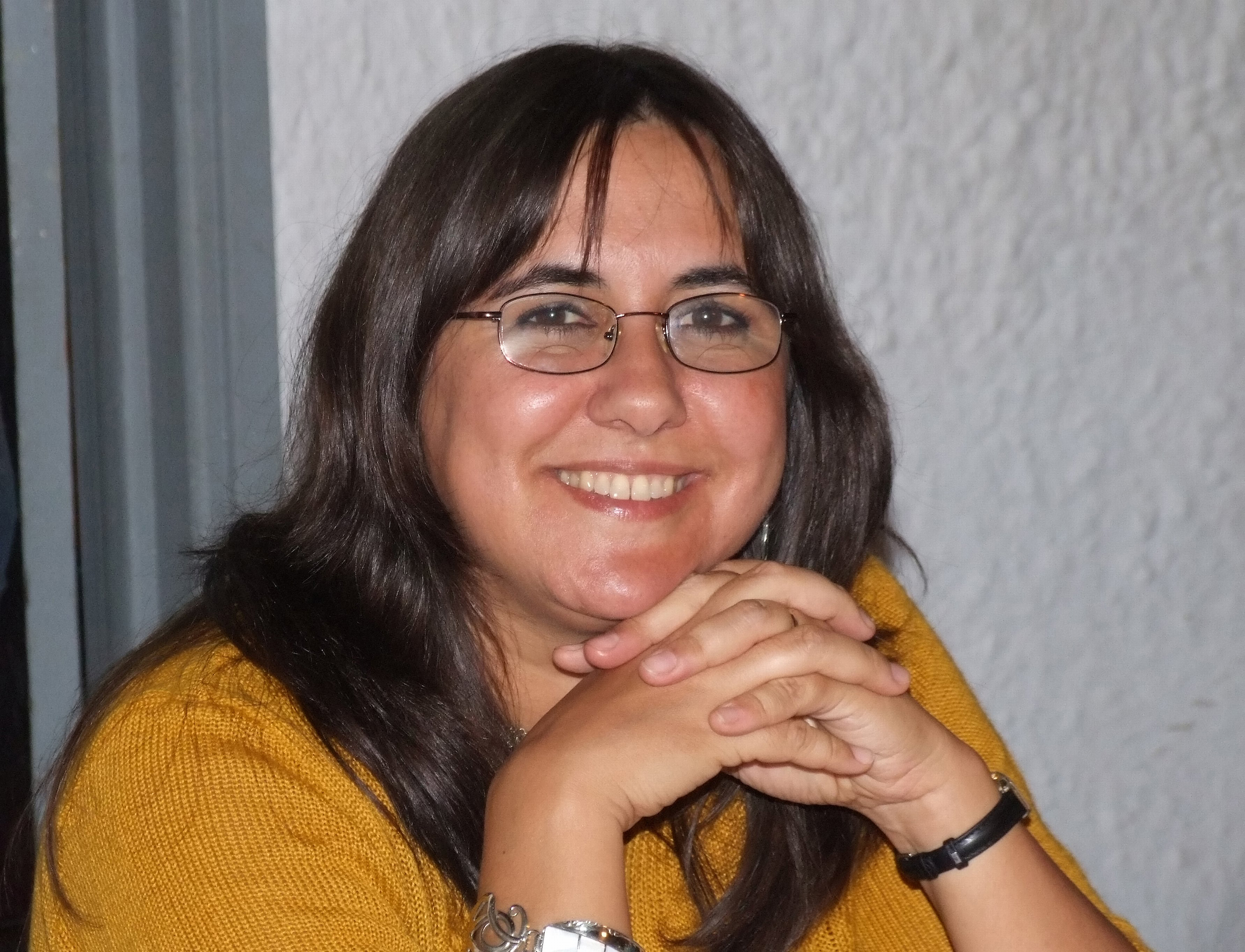 Magdalena Helguera Rabassa